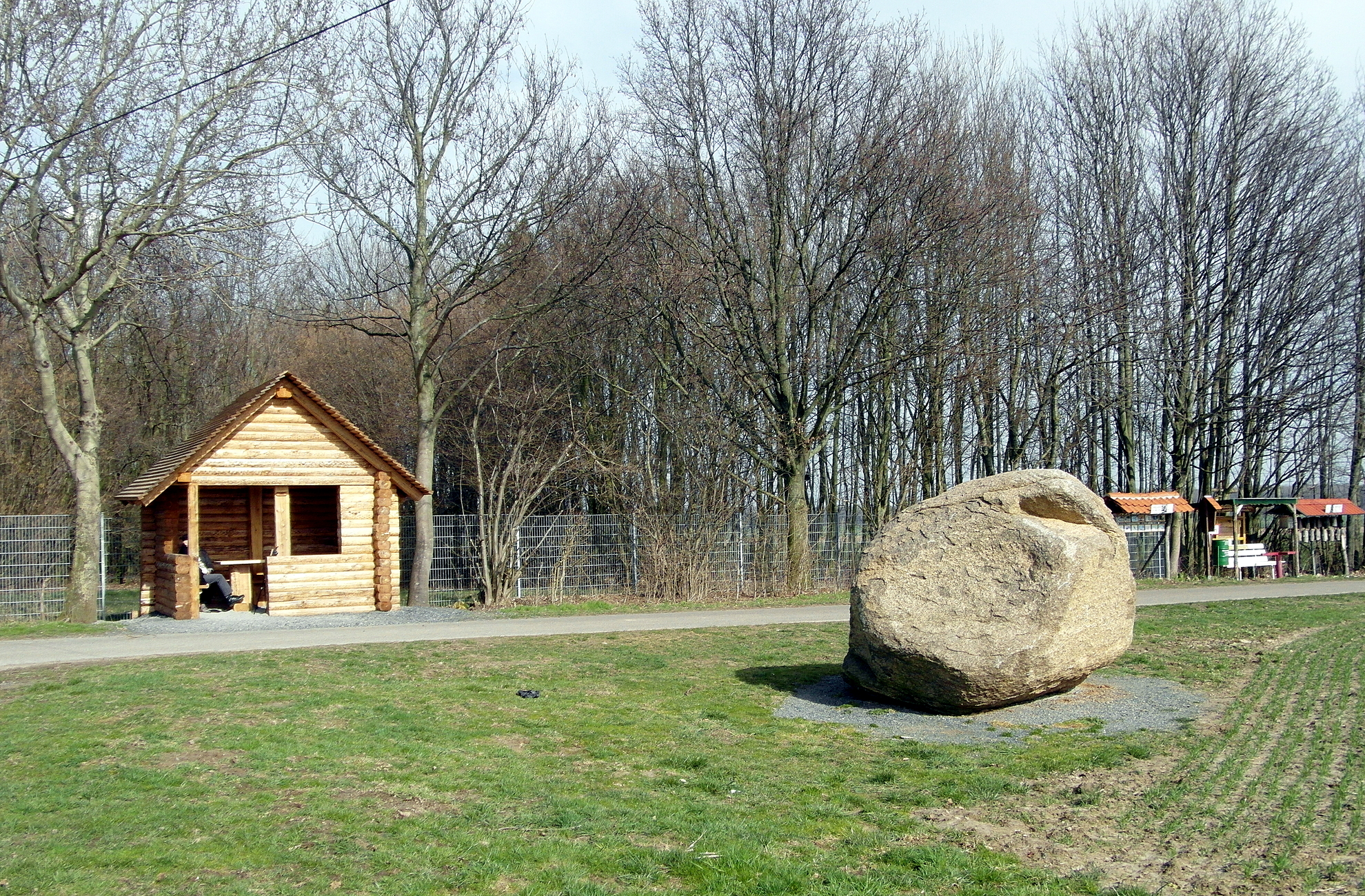 Im Dezember 2016 errichtete Schutzhütte am Naturdenkmal Gneis auf dem Mühlenberg bei Ostermunzel.